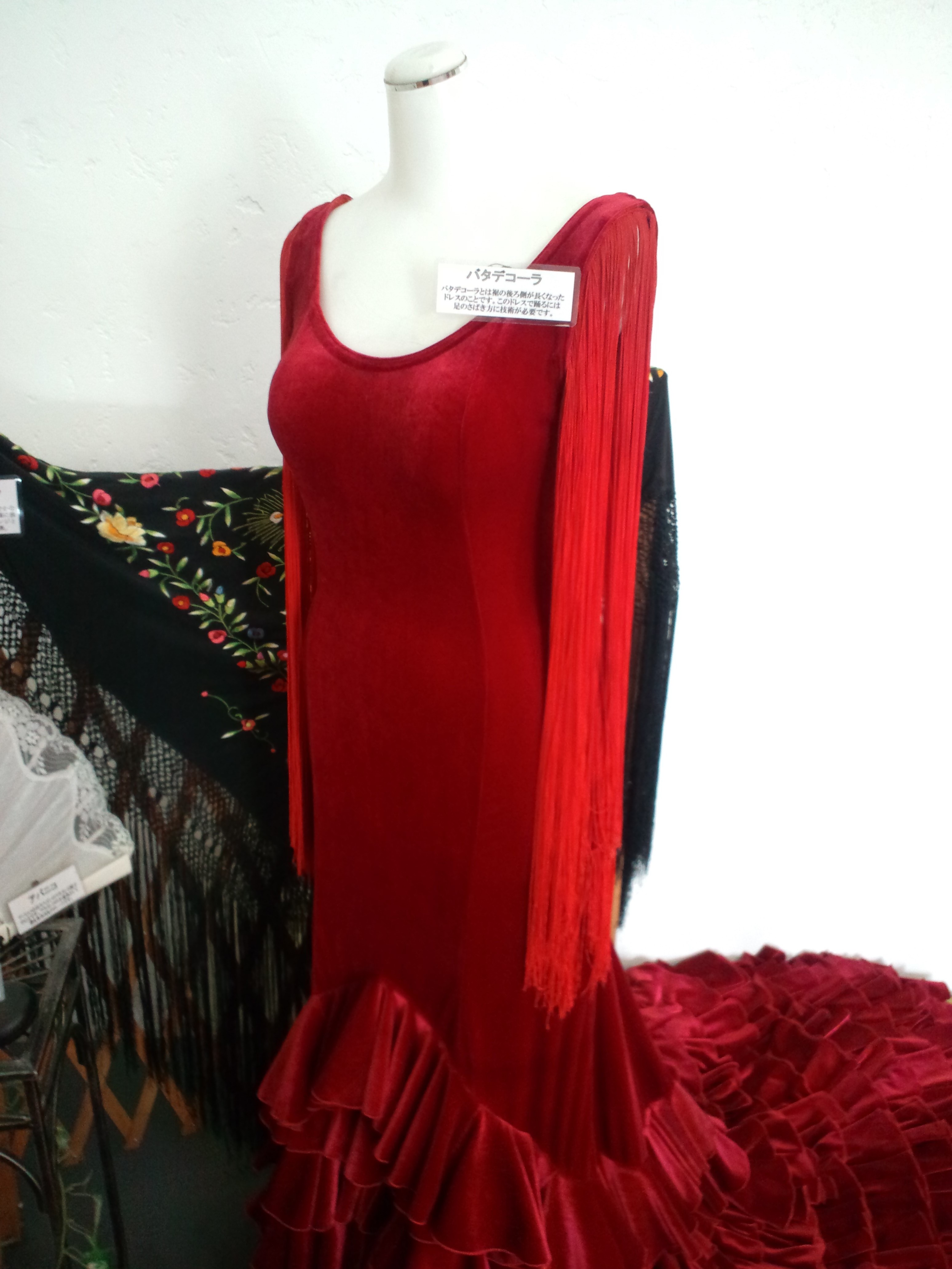 志摩スペイン村、パルケエスパーニャ カルメン・ホール バタデコーラ